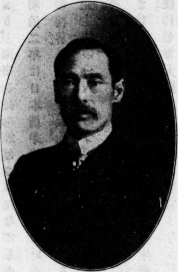 梅浦精一氏